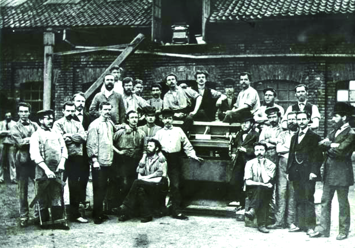 Foto der Belegschaft der Maschinenfabrik C. Reuther & Reisert 1881 oder 1883. Rechts an der Waage Eduard Reisert, ganz rechts Carl Reuther